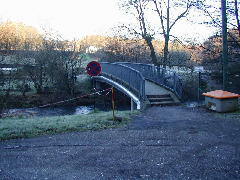 Der Fußgängersteg in Radevormwald-Krebsögersteg